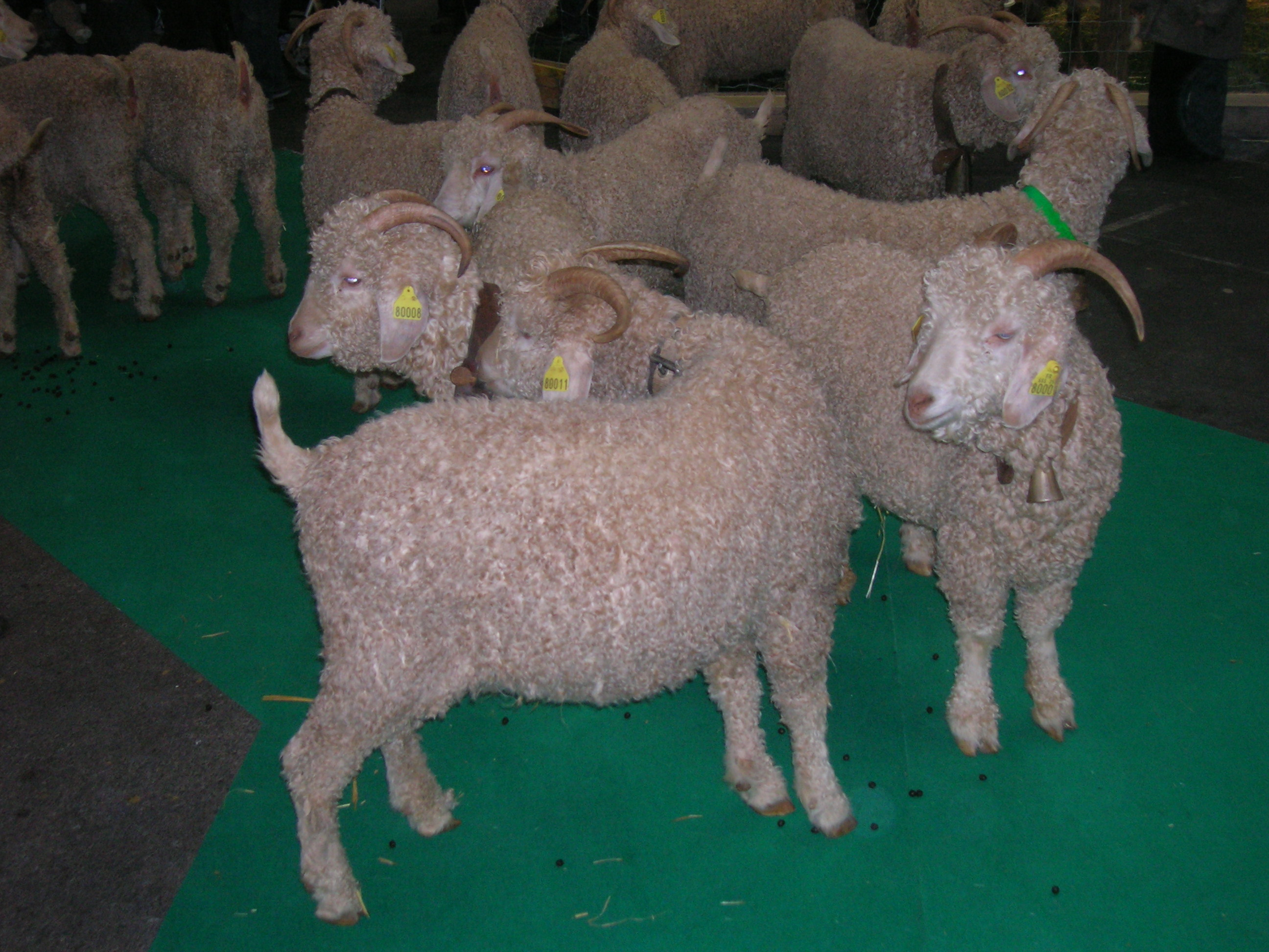 Troupeau de chèvres angora au salon SISQA de Toulouse. (salon agroalimentaire et agricole)